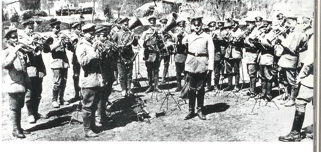 14. Preussiska Jägarbataljonens musikkår Åland 1918